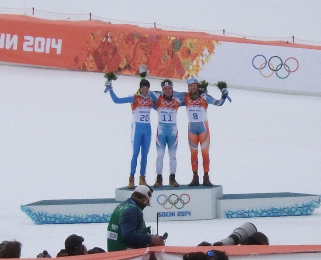 Цветочная церемония награждения победителей Зимней Олимпиады в Сочи в скоростном спуске